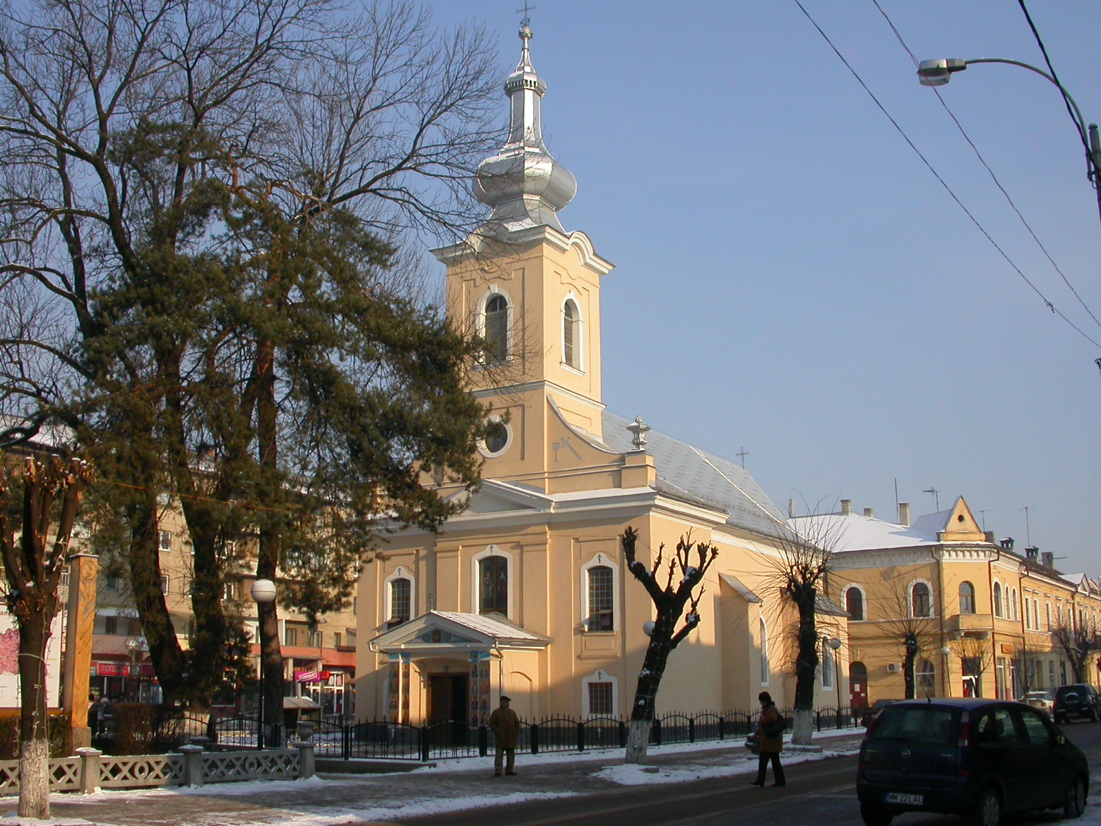 Biserica ucraineană "Înălțarea Sfintei Cruci" 1791-1807